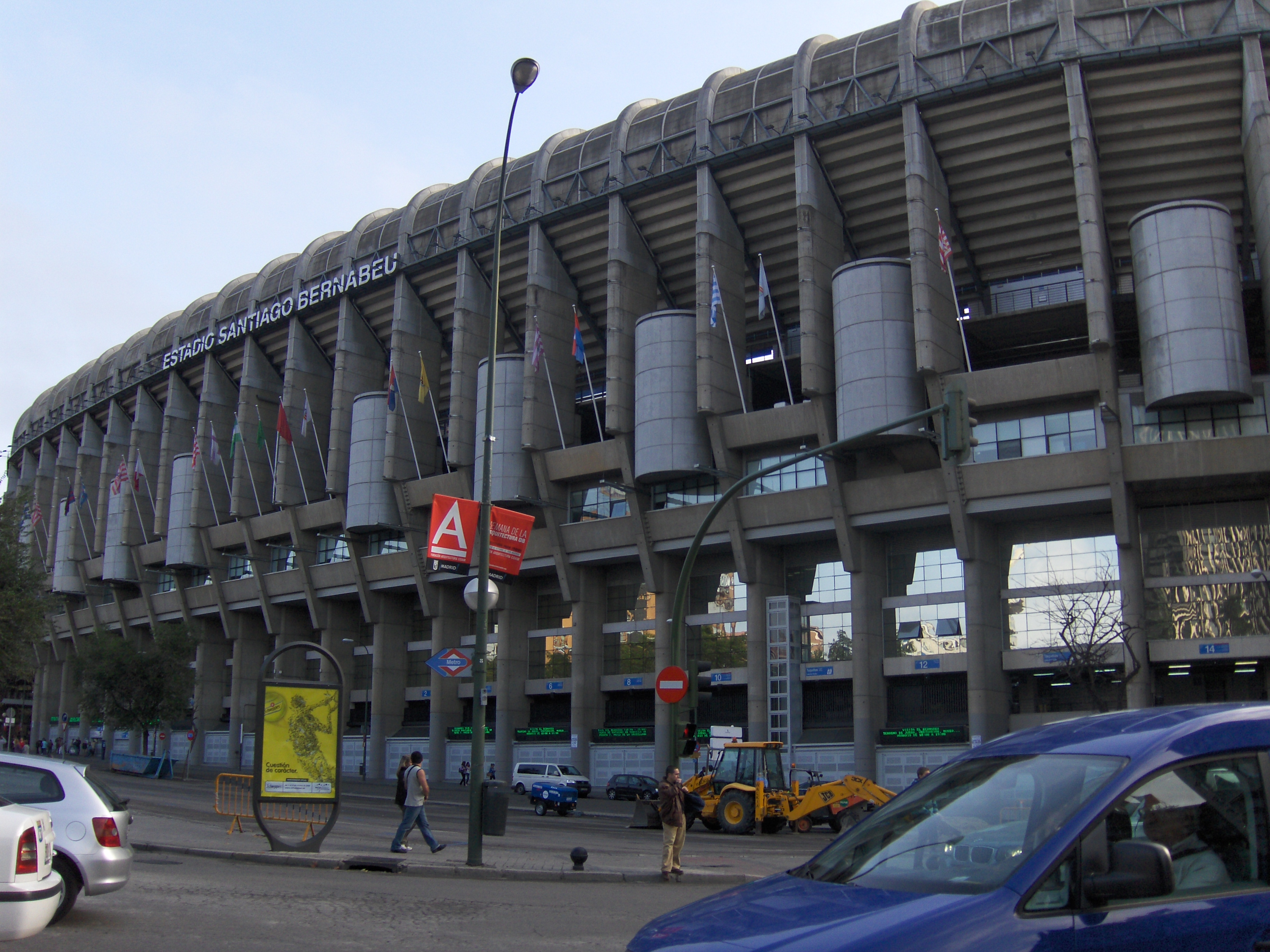 Frontal del Estadio Santiago Bernabeu